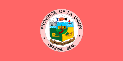 Dit materiaal is afkomstig van of en is door de auteur Jaume Ollé als GFDL beschikbaar gesteld, zie de toestemmingsemail. Hiermee vervallen de strictere voorwaarden in de disclaimers op de genoemde sites.Vrijgegeven bijdrage op Flags of the World van Jaume Olle. Zie deze verklaring op de Spaanstalige Wikipedia. GNU FDL